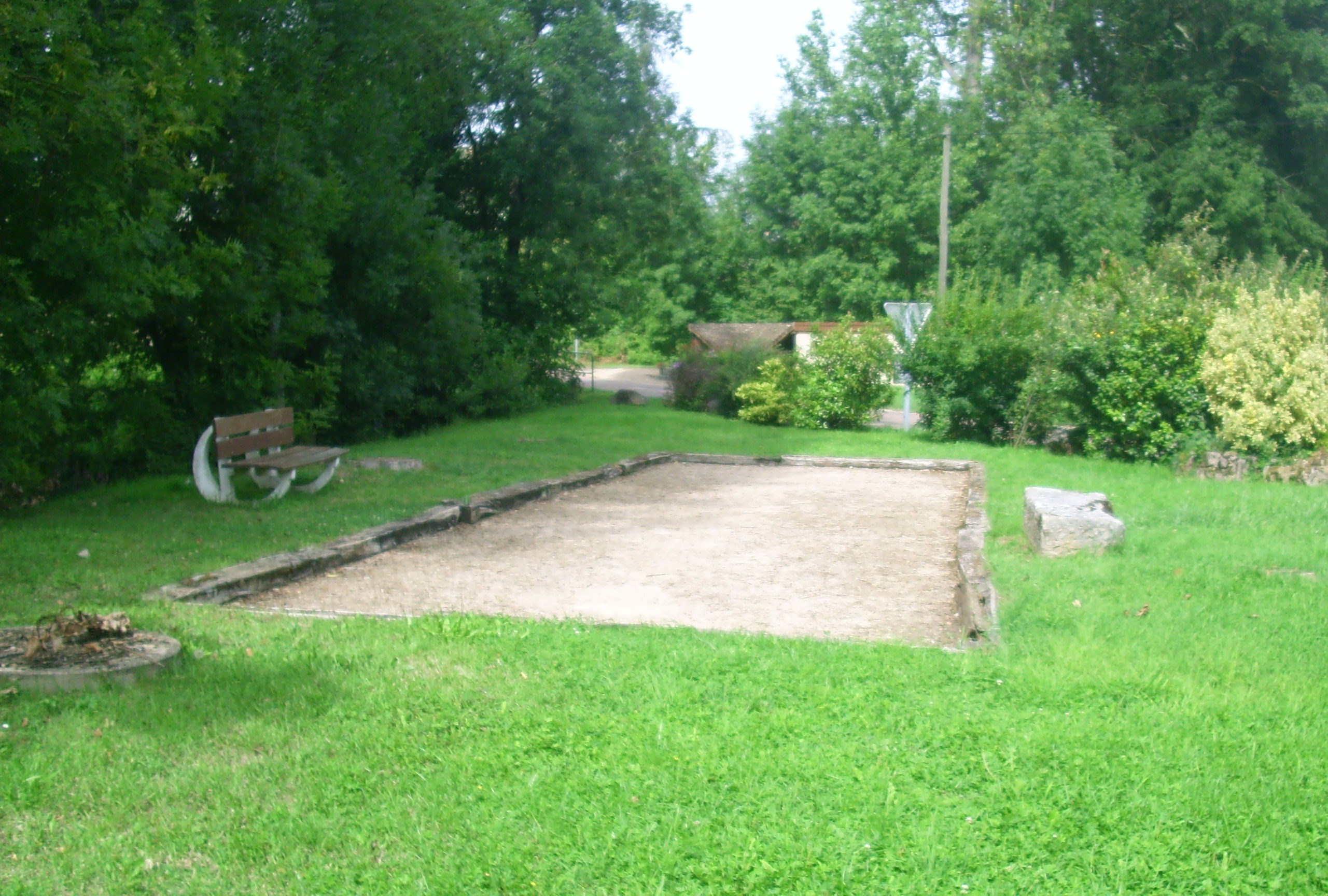 Un petit terrain de pétanque à Saint-Martin-sous-Montaigu (71)